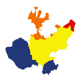 Mapa fisiográfico de Jalisco Región Sierra Madre Occidental Región Sierra Madre del Sur Región Región Eje Volcánico Transversal Región Mesa Central